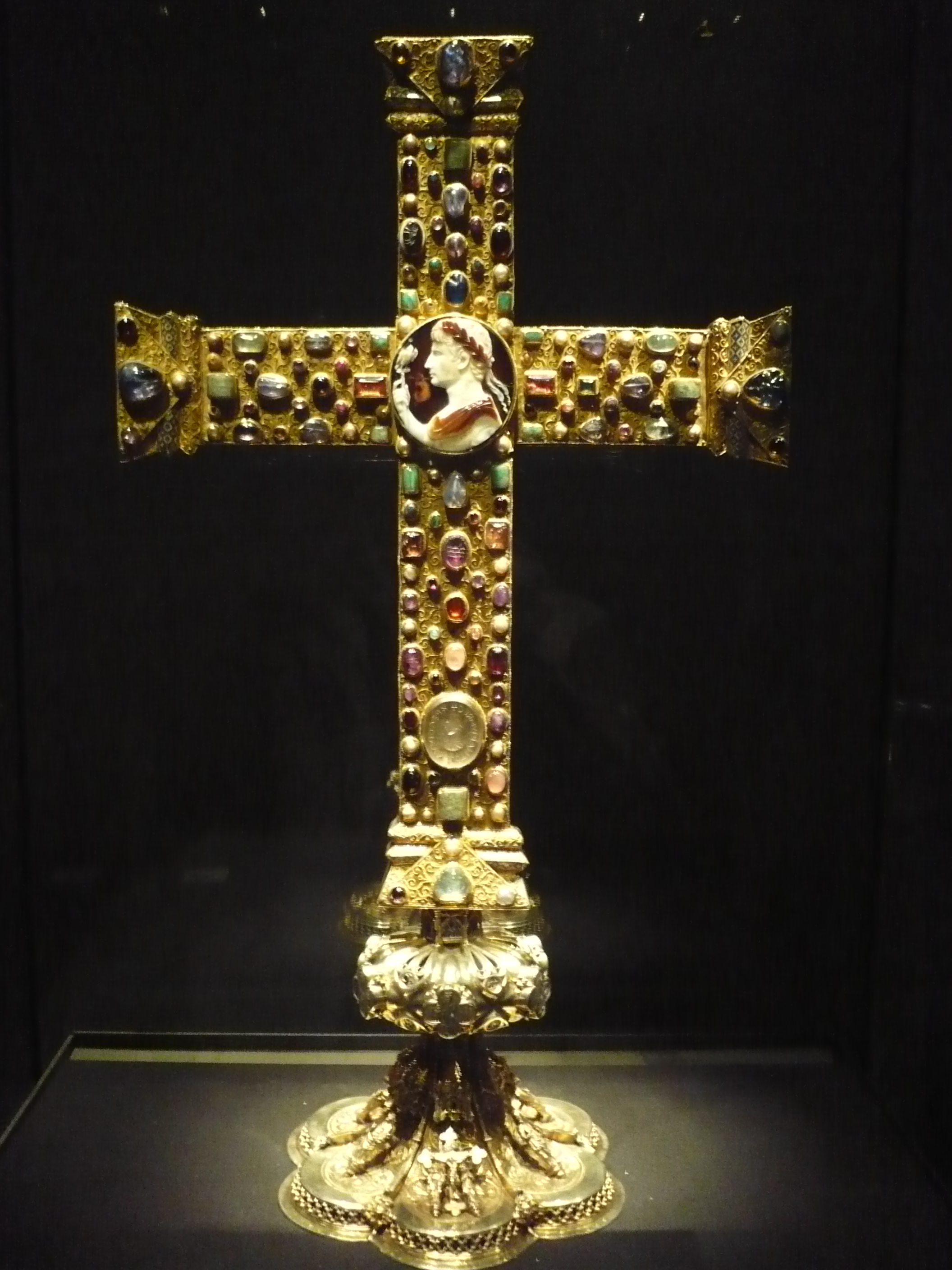 Lotharkreuz, Kaiserseite, Juni 2008